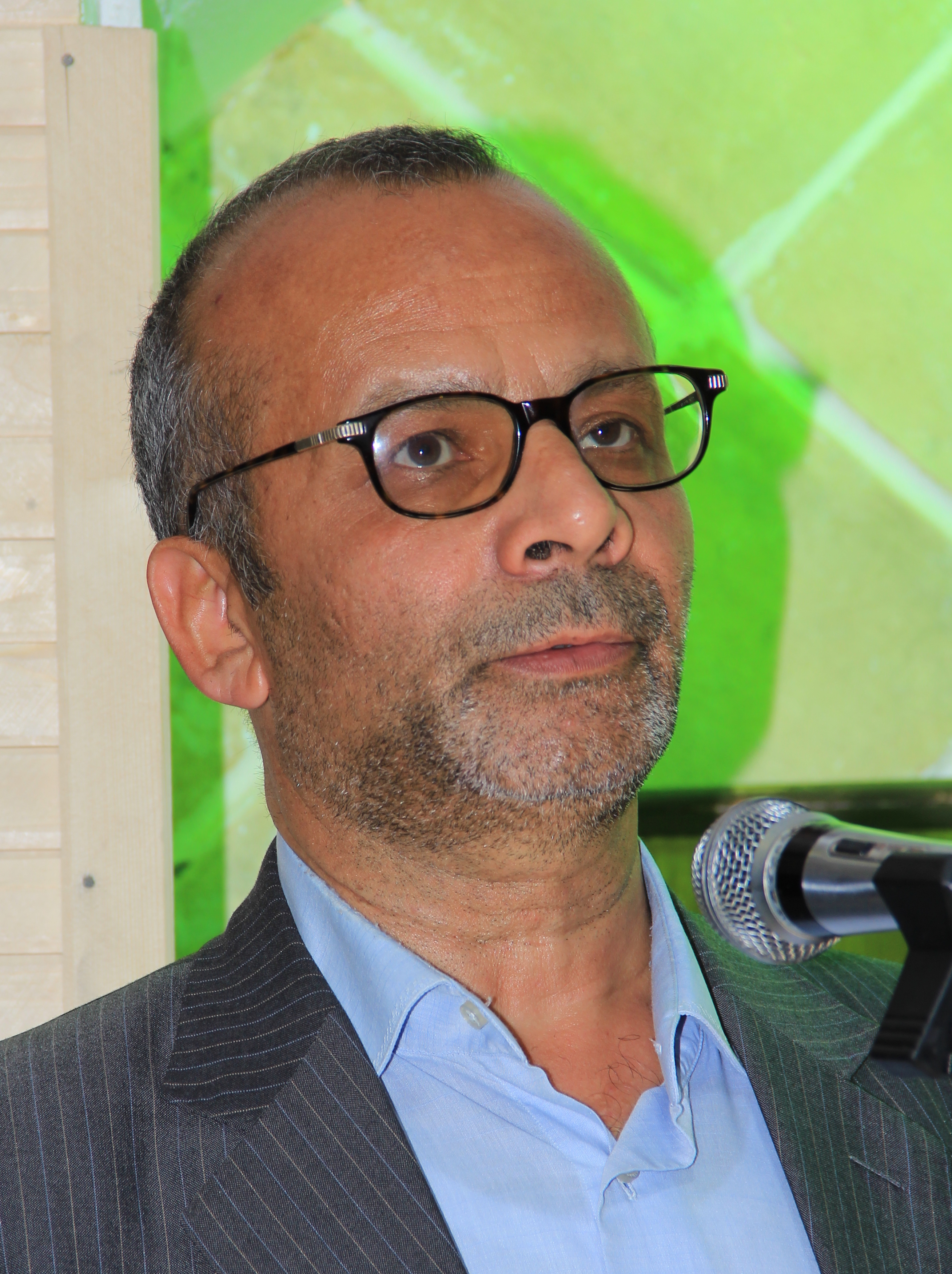 محمودزمانی قمی- تفرش- استان مرکزی